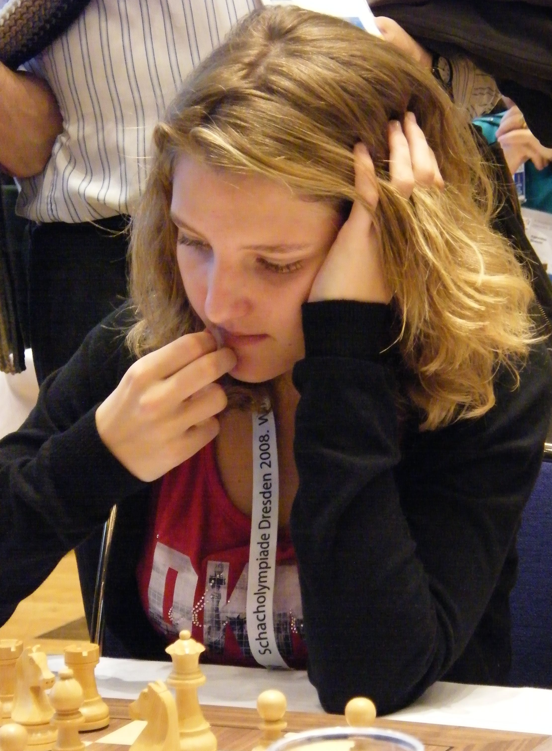 Katrine Tjolsen bei der 38. Schacholympiade in Dresden 2008